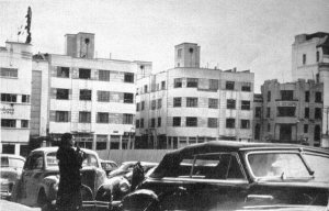 Centro de Bogotá 40's Pasaje Santa Fe